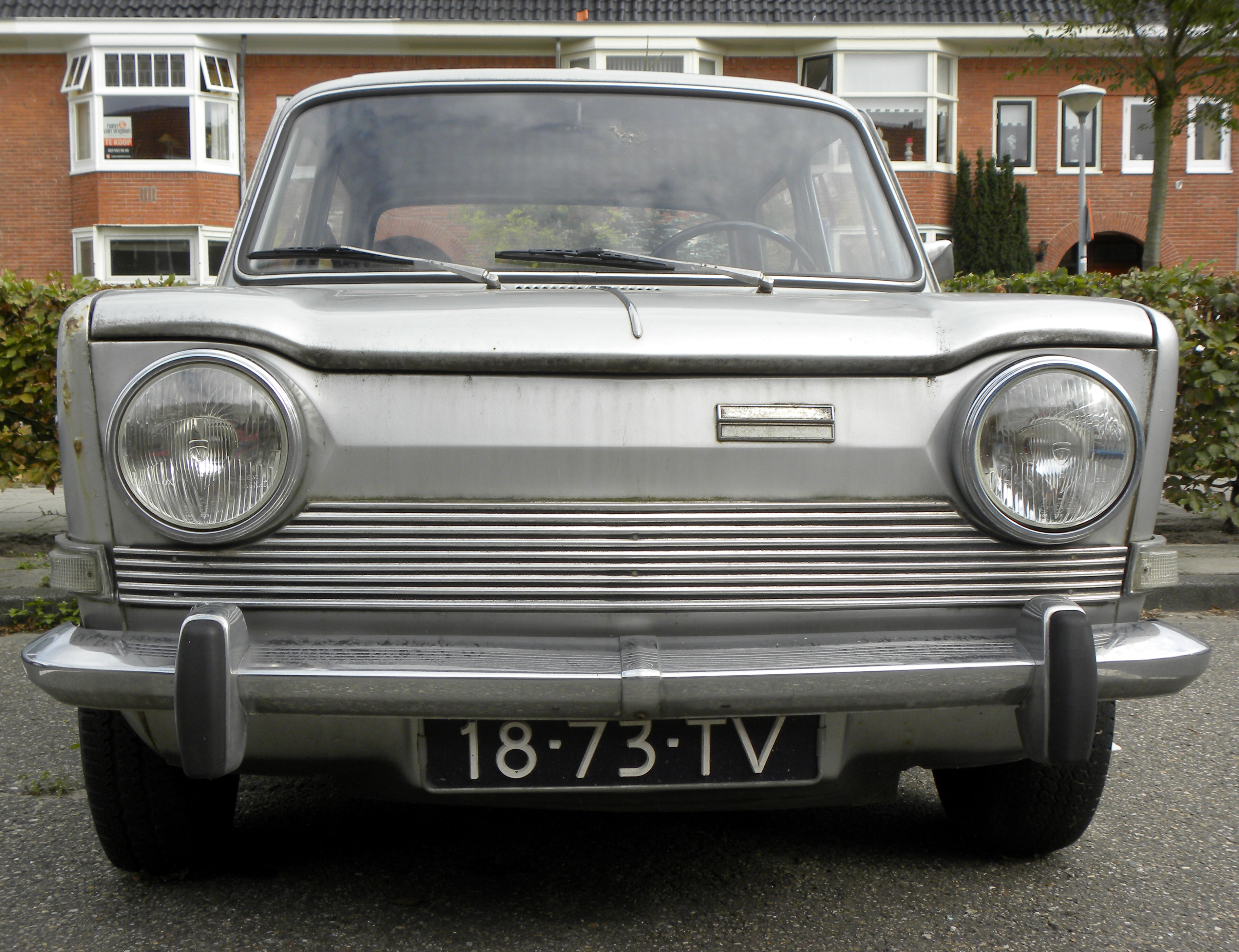 Simca 1000 GLS